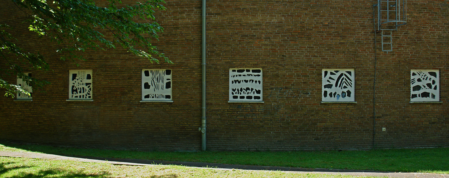 Kath. St.-Hedwig-Kirche der Pfarrgemeinde St. Raphael. Bremen, Kurt-Schumacher-Allee 62. Das abgebildete Objekt ist ein geschütztes Kulturdenkmal in der Freien Hansestadt Bremen, mit der Nr. 1175 beim Landesamt für Denkmalpflege registriert.